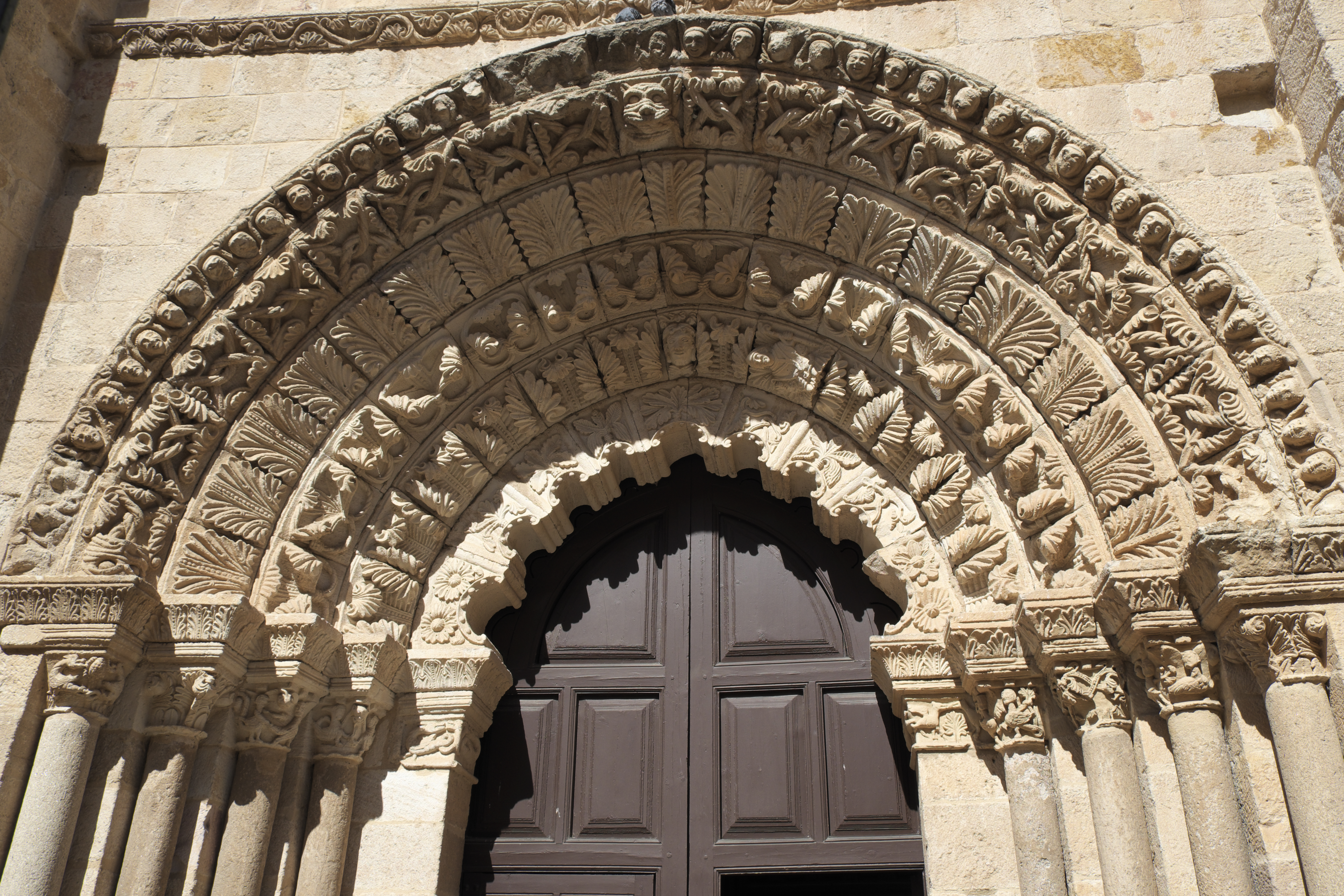 Portal der Kirche Santa María Magdalena in Zamora (Kastilien-León/Spanien), skulptierte Archivolten